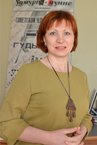 Удмурт: Главный редактор газеты "Удмурт дунне" З.К. Рябинина